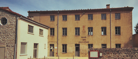 Sujet : façade de la maison des associations et bibliothèque de Maclas (Loire Date : 8 juin 2005 Source : photo personnelle d'Archeos Description : façade d'une grosse maison, abritant auparavant la mairie. Notez la croix en briques ornant la façade, et l'œil-de-bœuf hexagonal. À Maclas, face à la maison des associations, route de Saint-Apollinard Licence : Mots-clés : architecture civile